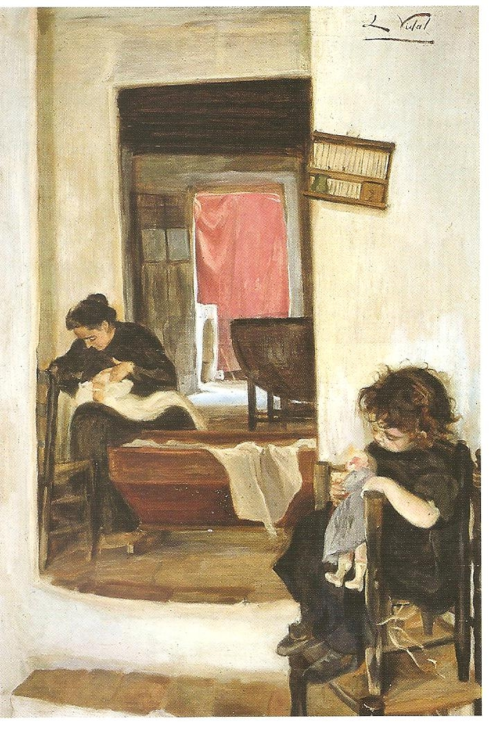 Catalan: Maternitat